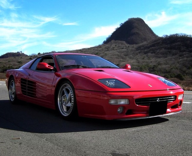 Ferrari F512M フロント